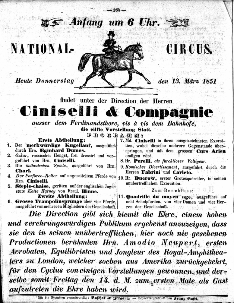 Ankündigung in der Wochenzeitung: Neuigkeiten, zugleich Fremdenblatt für Brünn und allgemeiner Anzeiger für Mähren, Ausgabe 13. Mai 1851